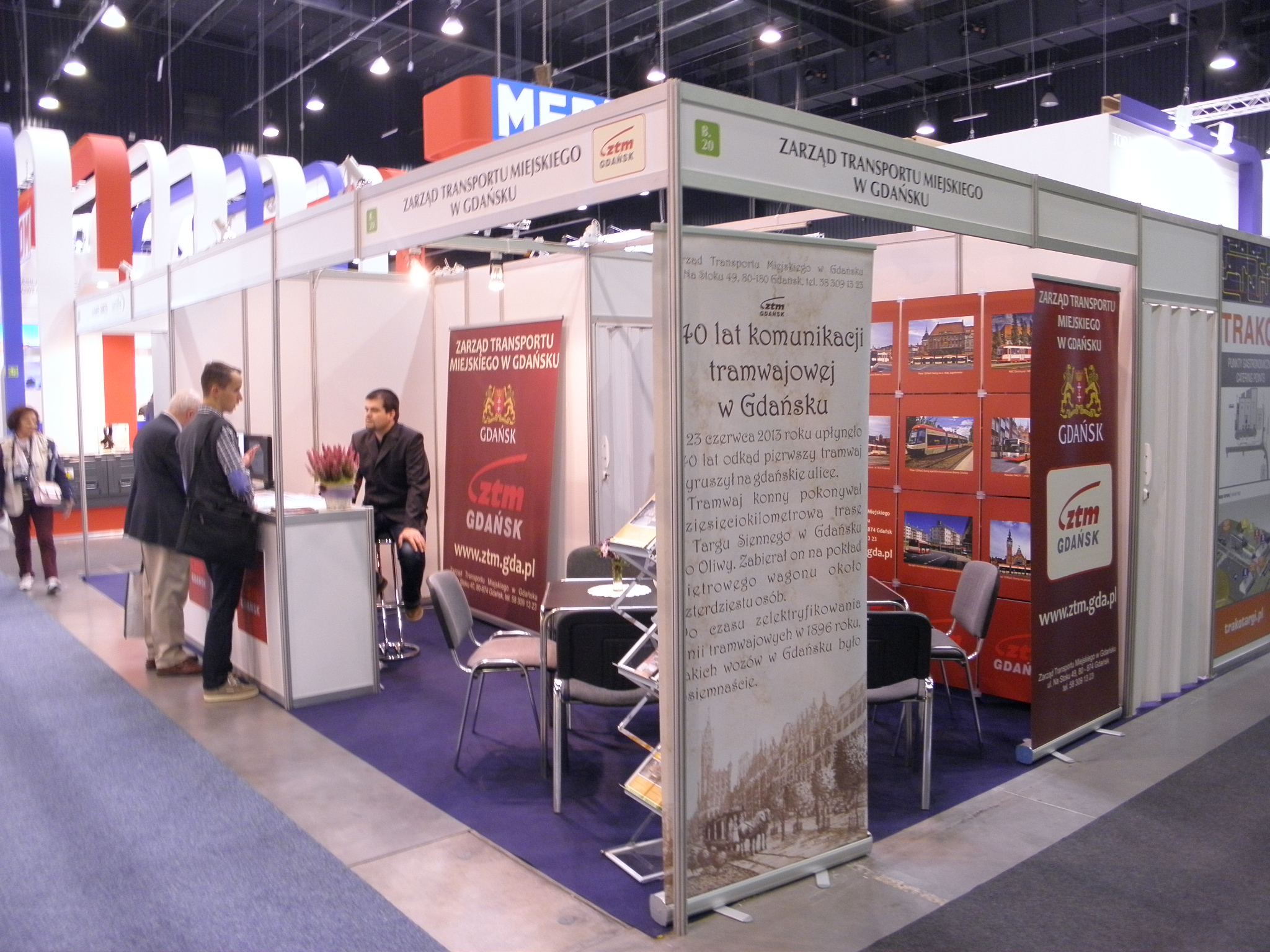 Photo from Trako 2013, Gdańsk/Danzig